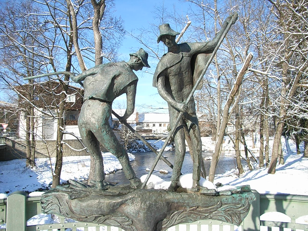 Flößer